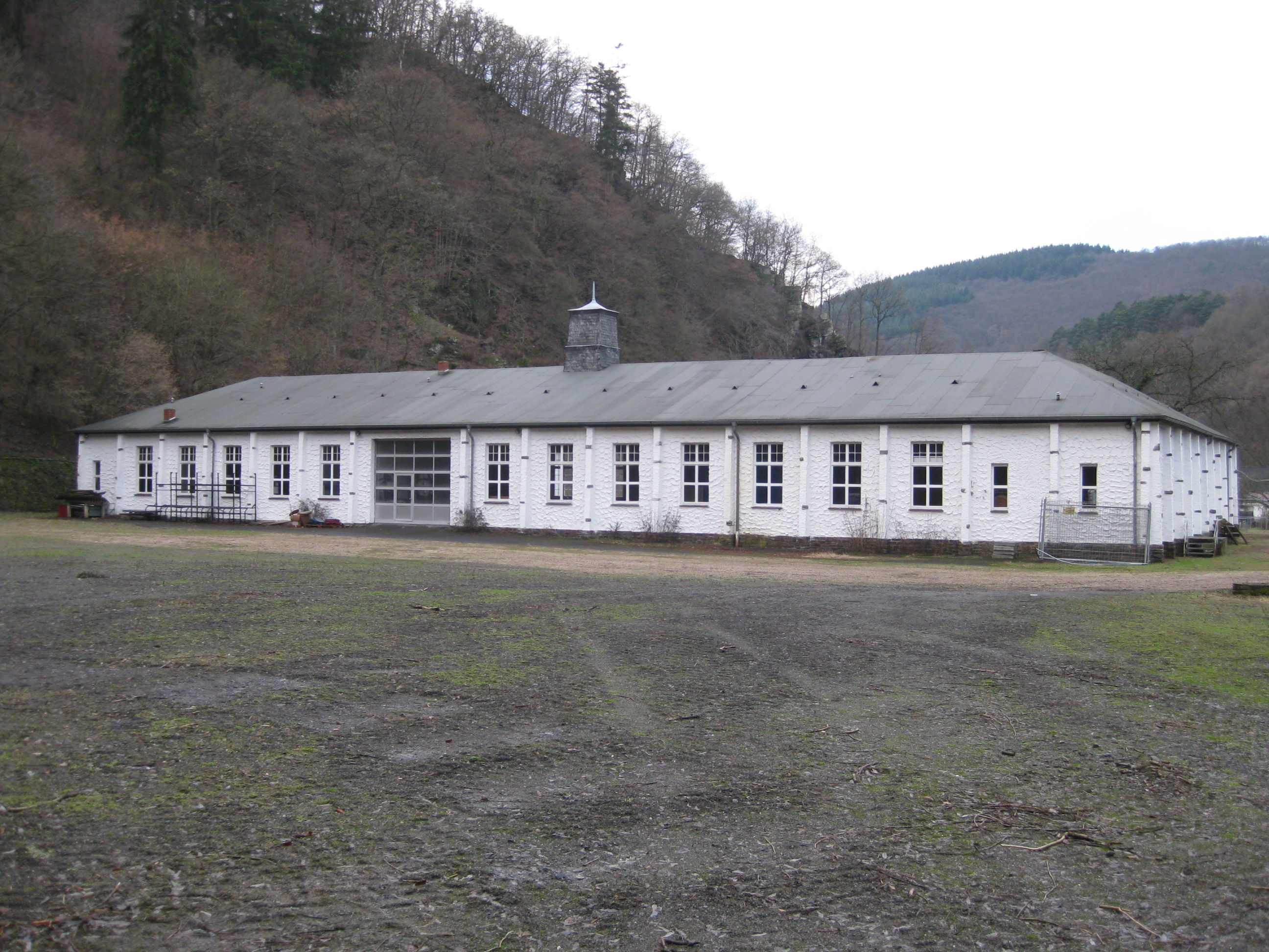 ehemalige Bleikristallbetrieb, vorher Luftwaffenübungsplatz Ahrbrück